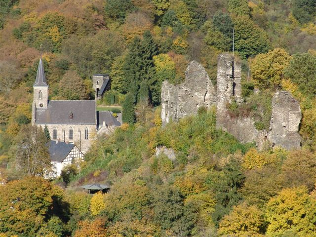 Ruine der Isenburg (Westerwald) und Kirche Sonstiges: Digitale Fotografie